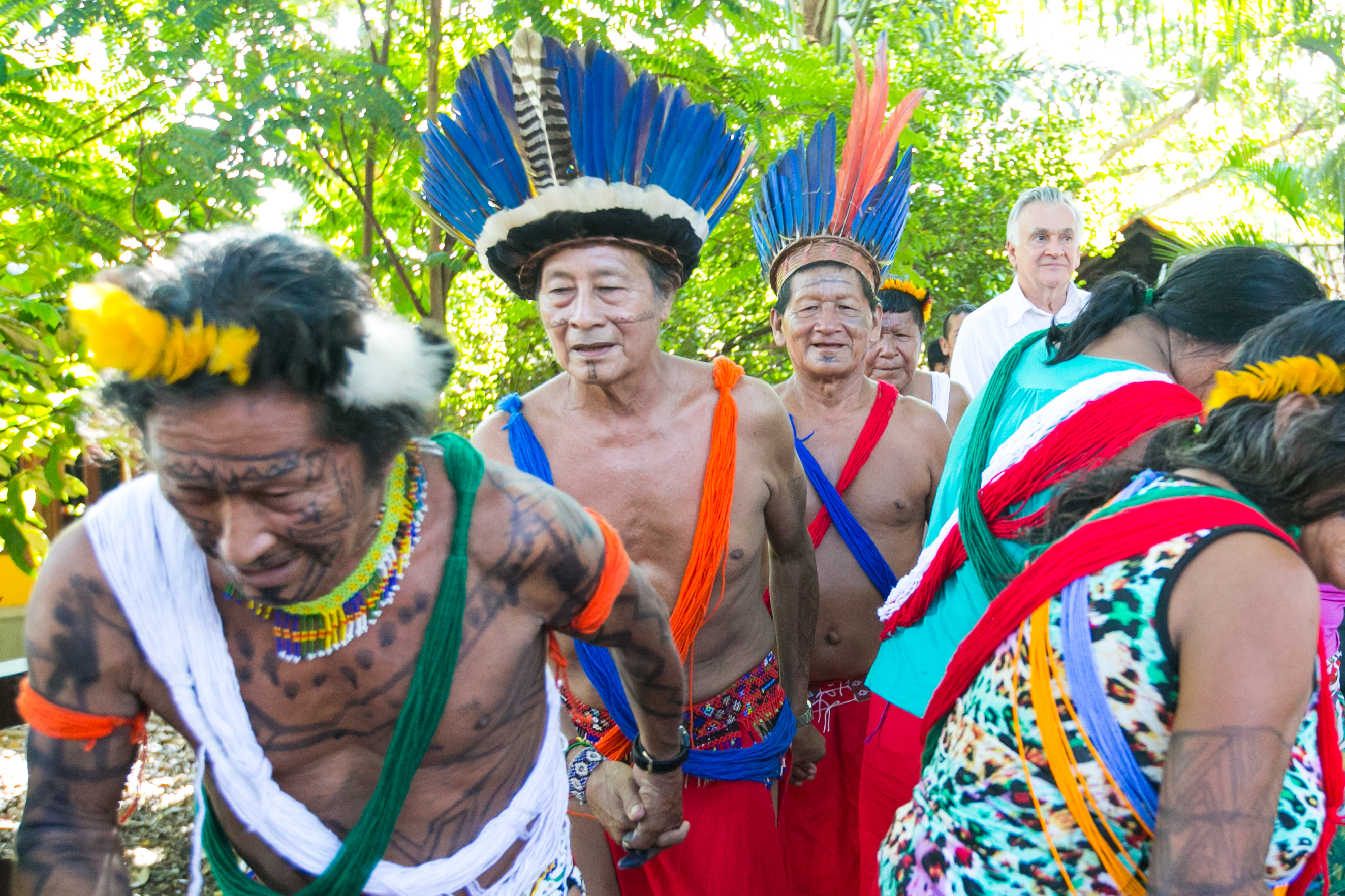 Centro de Pesquisas Museológicas Museu Sacaca; As etnias Waiãpi e Apalai recepcionaram a comitiva do MinC na chegada ao Museu Sacaca. Macapá-AP 25/06/2015 Foto:LiadePaula/MinC